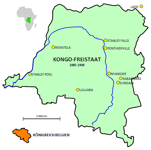 Dimensionen des Kongo-Freistaats und Grössenvergleich mit Königreich Belgien